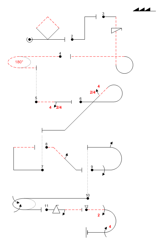 Aresti sequence for aerobatics